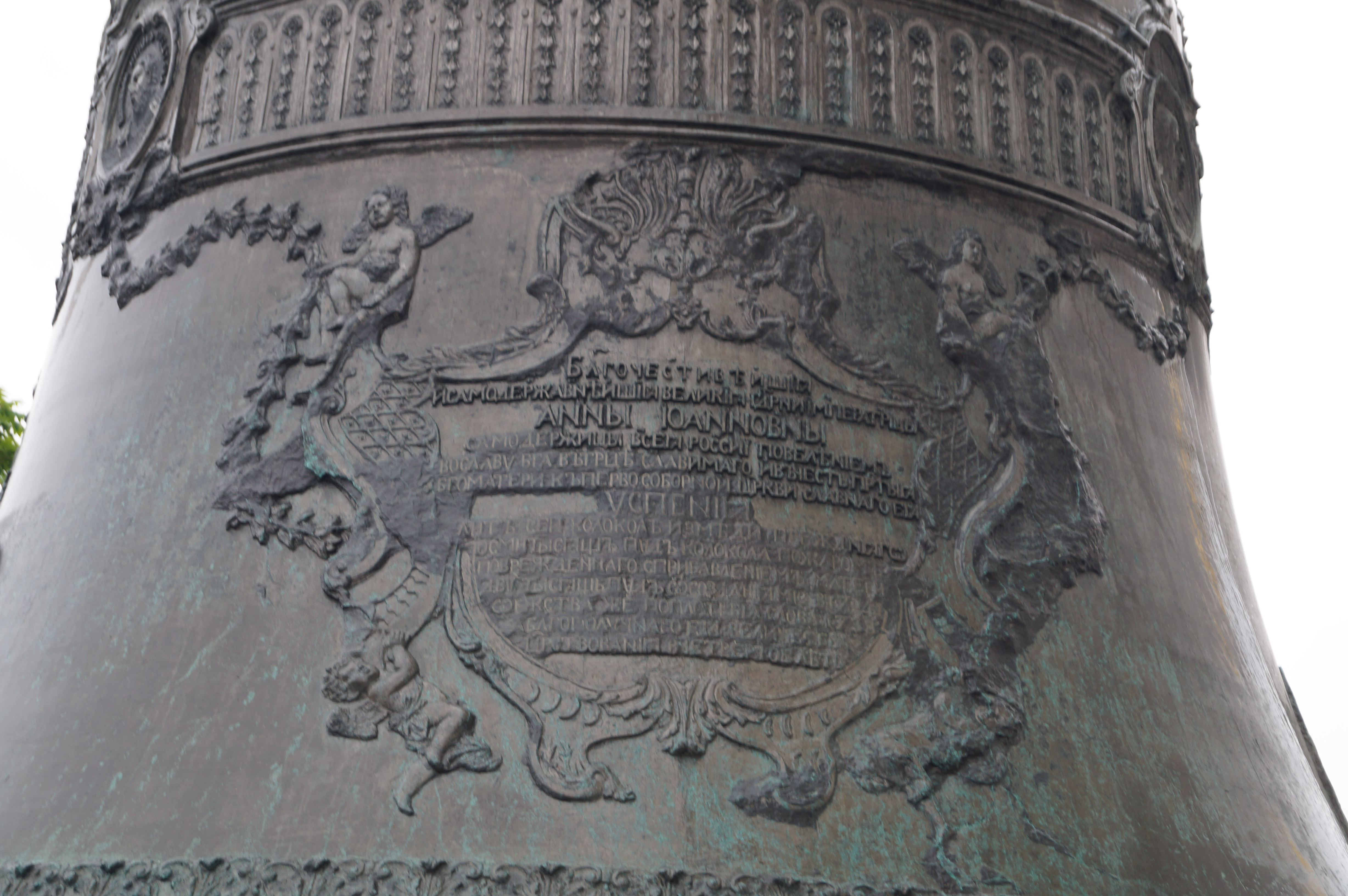 Территория культурного слоя Московского Кремля: Тверской, Центральный округ, Москва